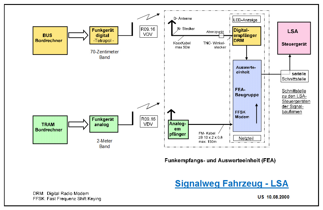 ÖPNV Funkmeldesystem an LSA - Signalweg